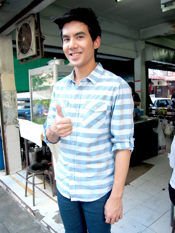 ฉันทวิชช์ ธนะเสวี